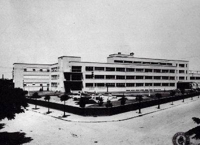 Pabellón de Maternidad Mouras, en el nuevo Hospital Penna de Buenos Aires. Edificio inaugurado con la presencia de la Primera Dama Eva Duarte de Perón el 15 de abril de 1948.